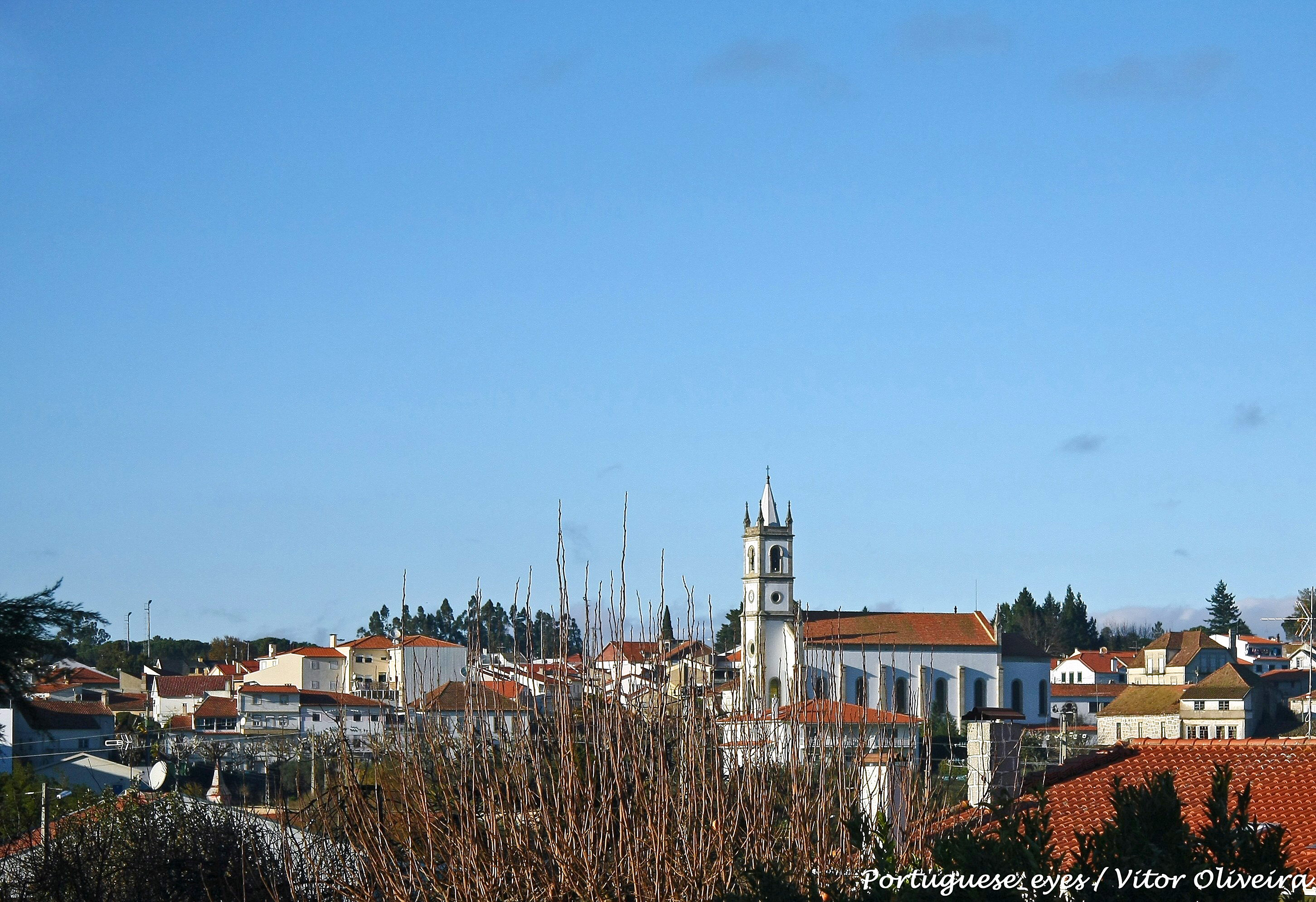 Vila Nova de Tázem - Portugal